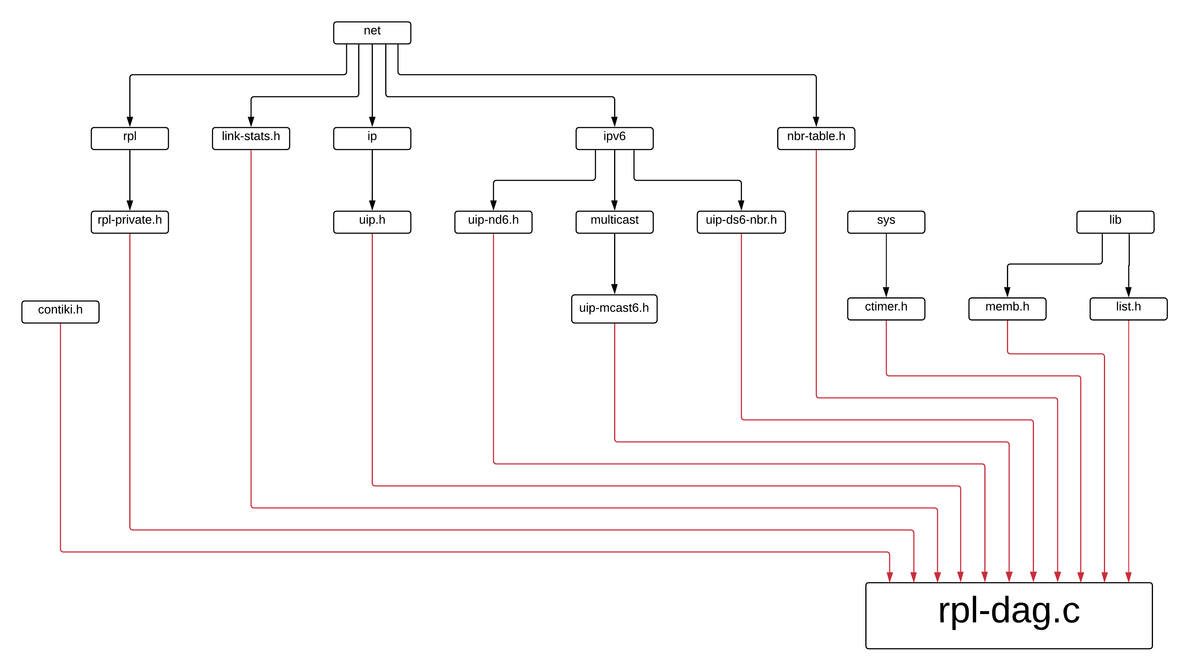 JerarquiaRPL